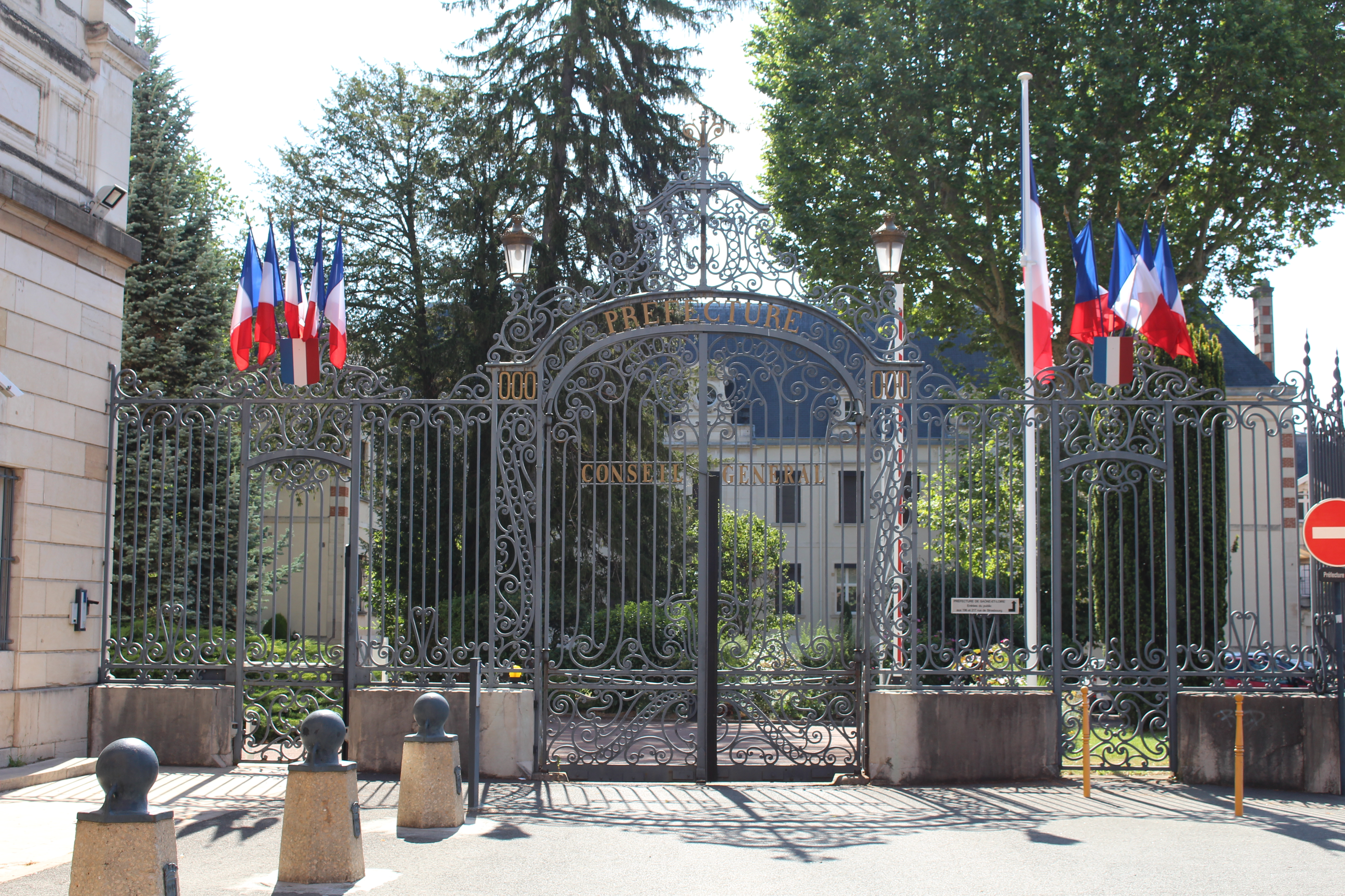 Portail de la préfecture de Saône-et-Loire, Mâcon.